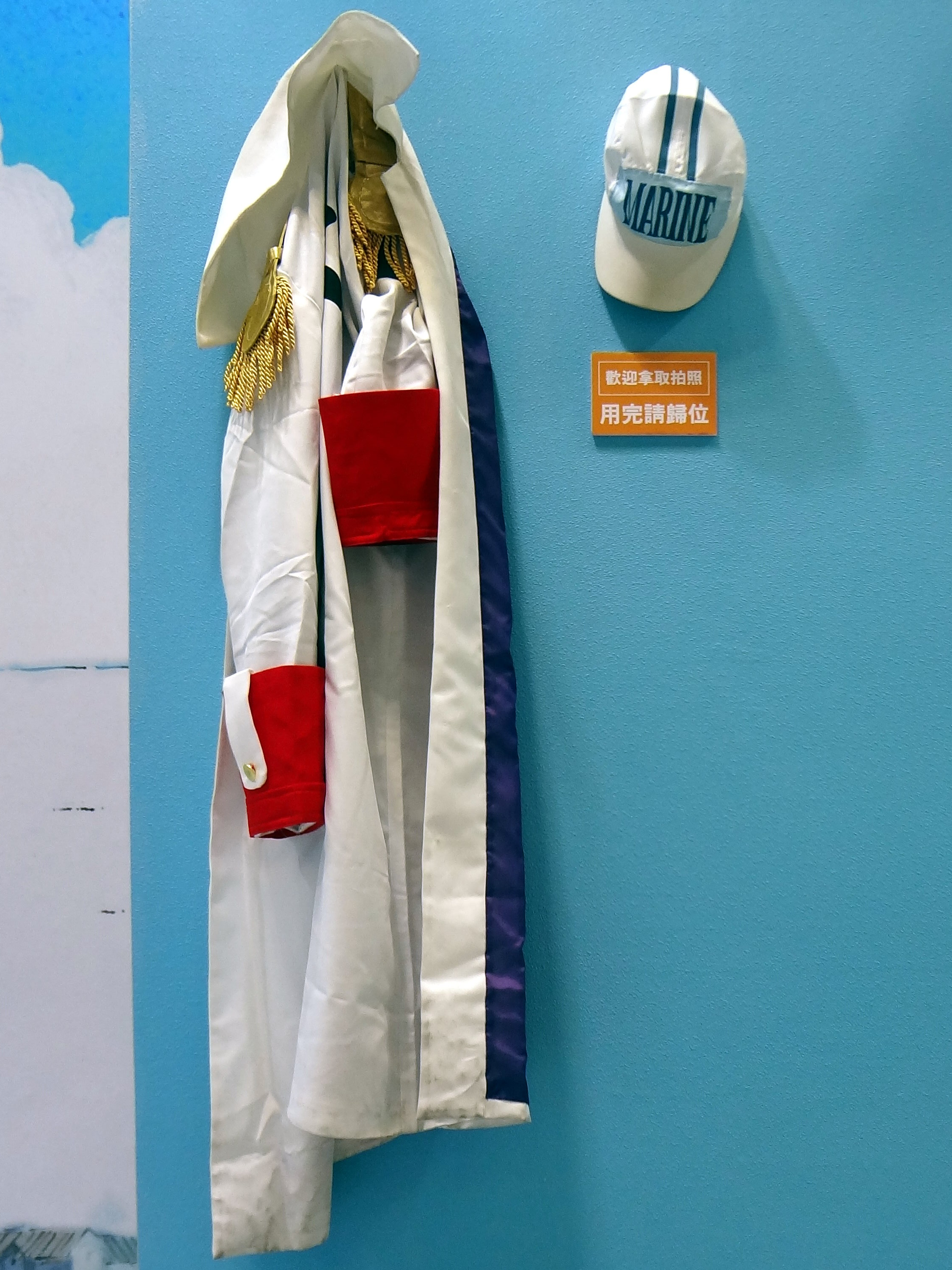 動漫爭艷嘉年華展區《航海王》主題館，「海軍·正義」道具：《航海王》海軍大衣與帽子。